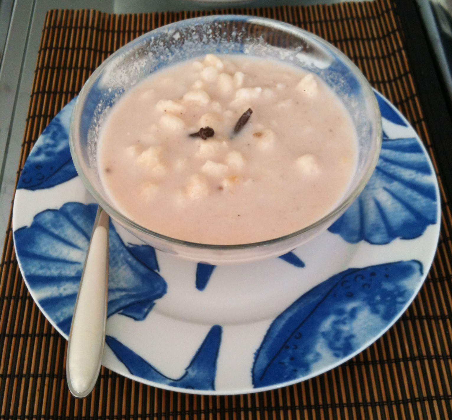 Tigela de manguzá doce servido em restaurante.